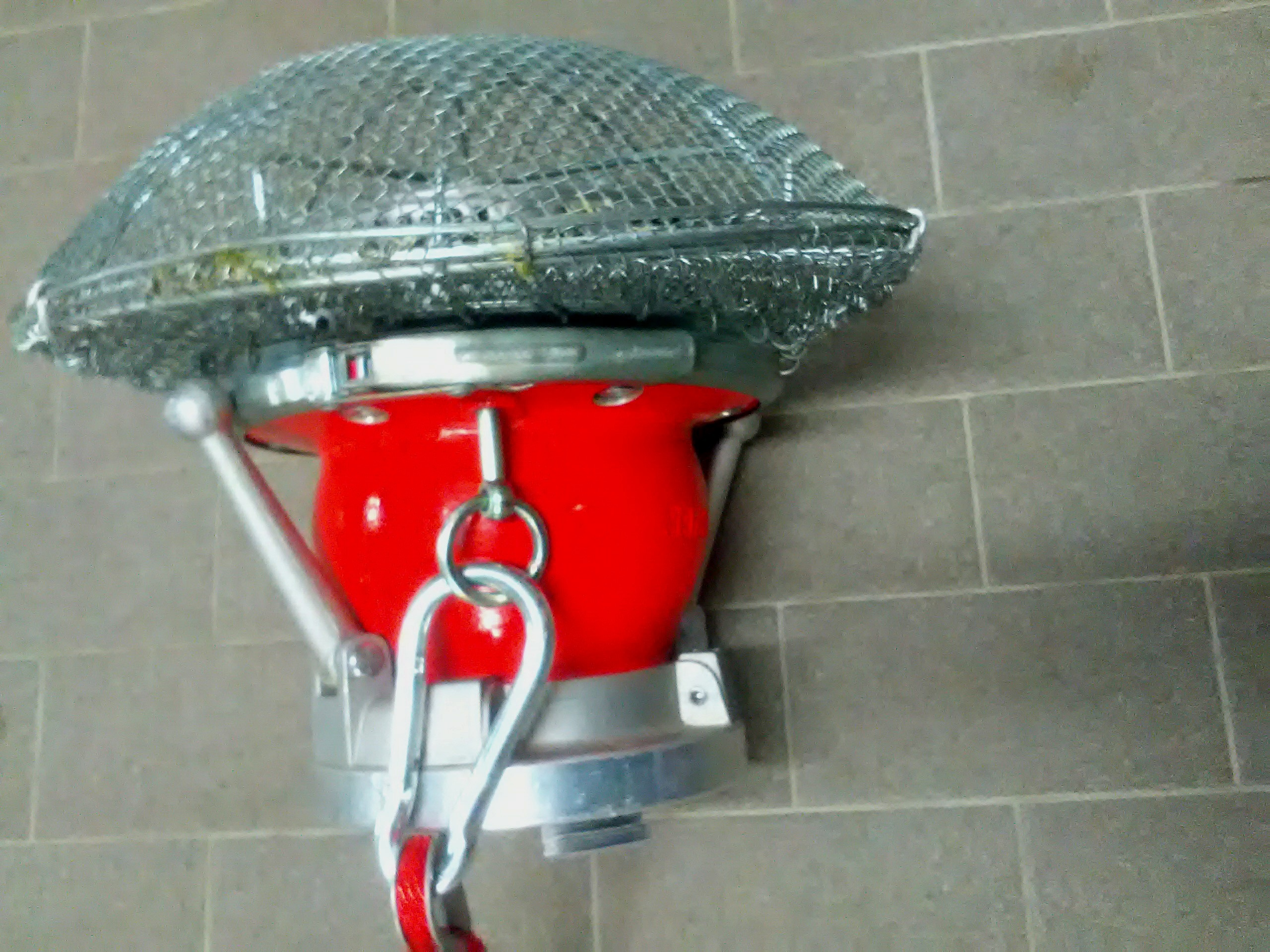 Patentierter Saugschutzkorb mit Festspannring und angehängter Ventilleine